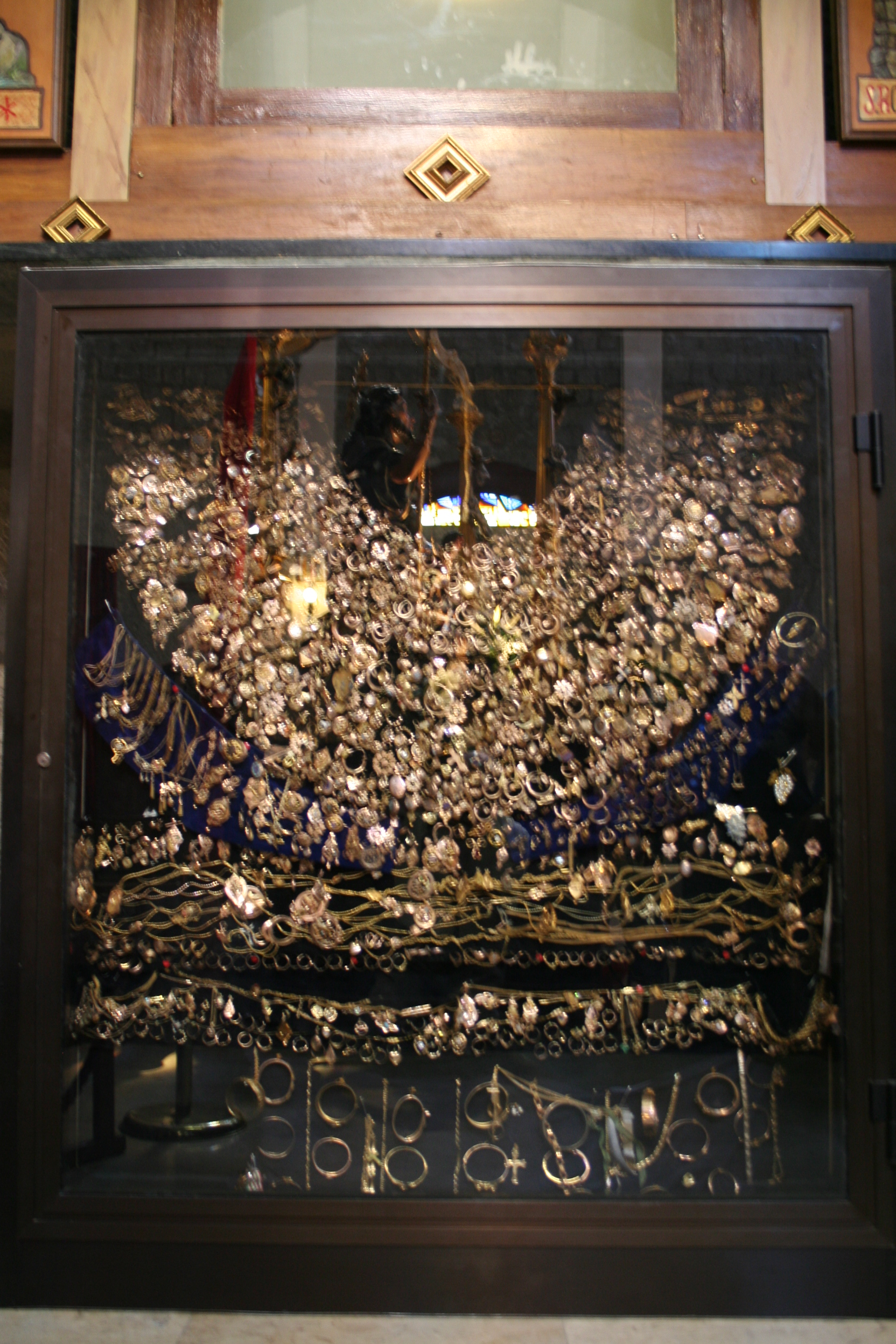 Oro di San Rocco esposto durante la festa a Satriano di lucania.